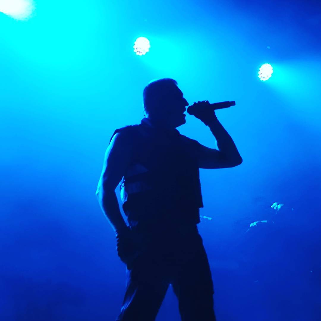 Front 242 - W-Festival 2017